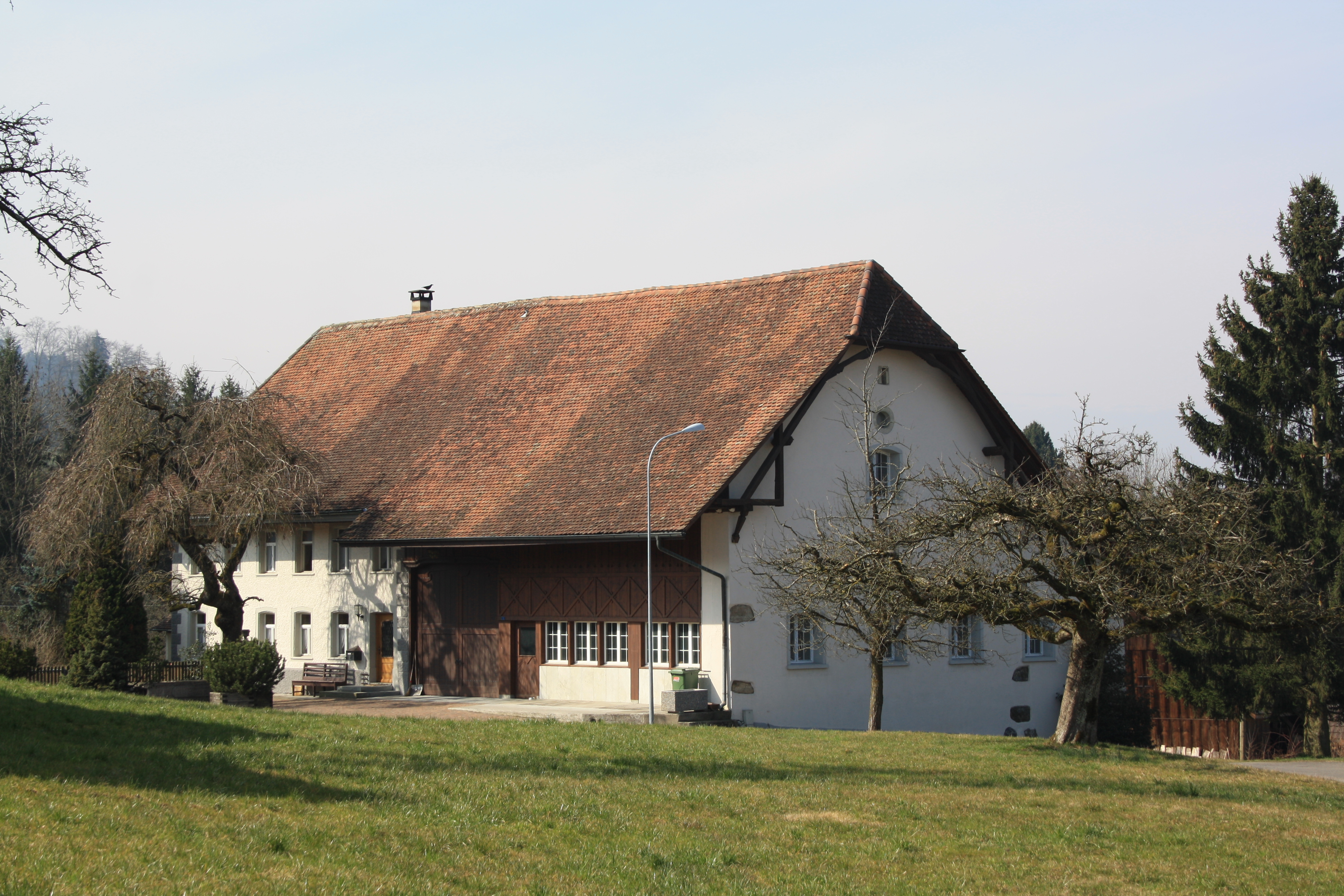 Dürrenäsch